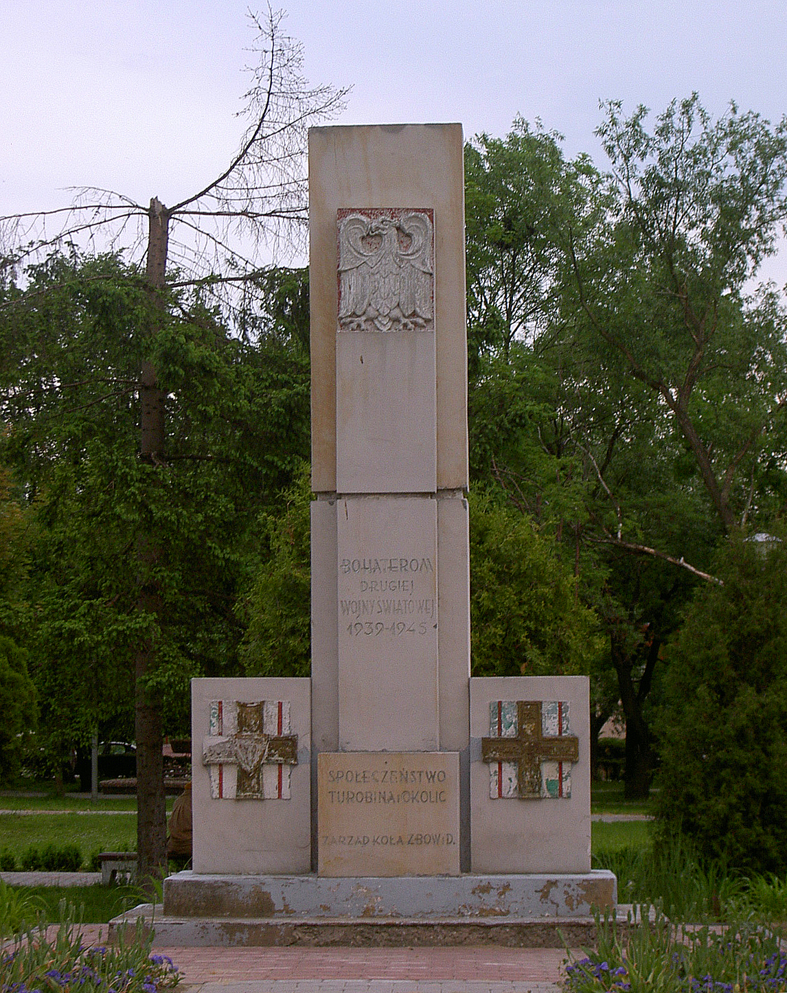 Turobin, Poland • Pomnik / Monument